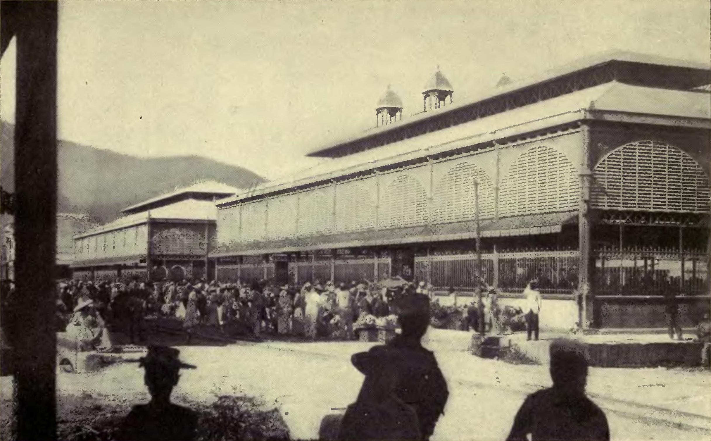 Central Market, Port-au-Prince